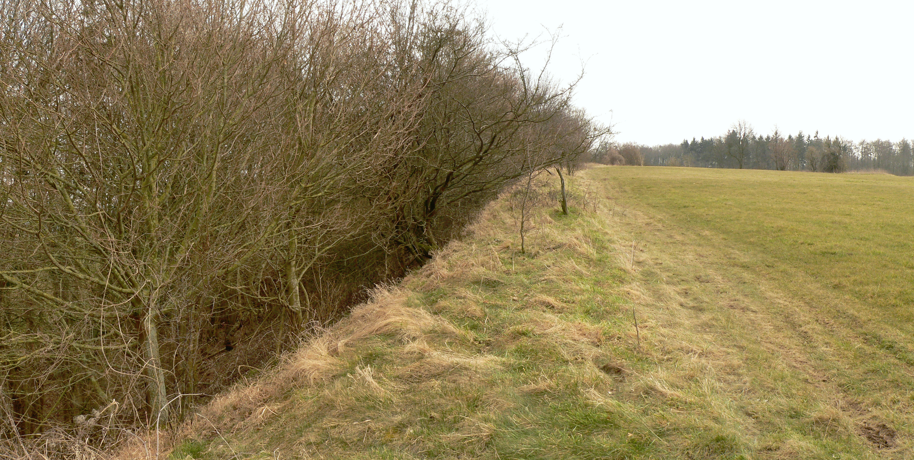 Geländekante auf dem Reichserntedankfestgelände im Osten